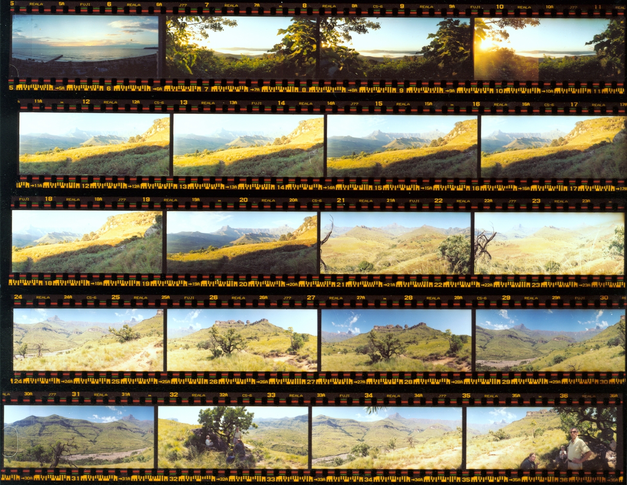 Широкоформатные кадры на плёнке, снято фотоаппаратом Горизонт 202